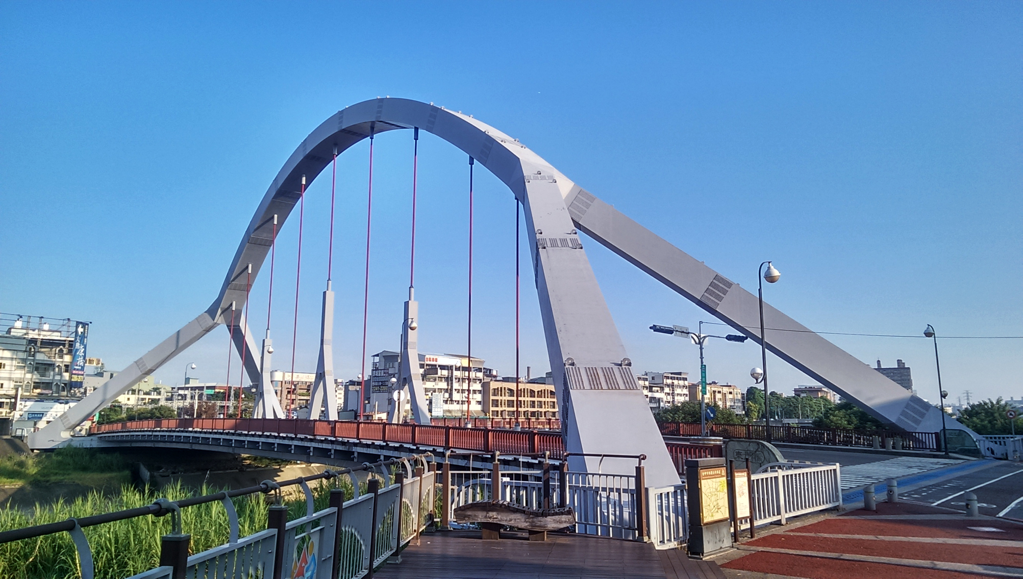 中文（台灣）: 東區東門橋